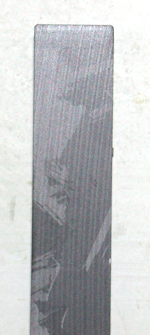 Photographie d'un barreau de silicium de qualité solaire